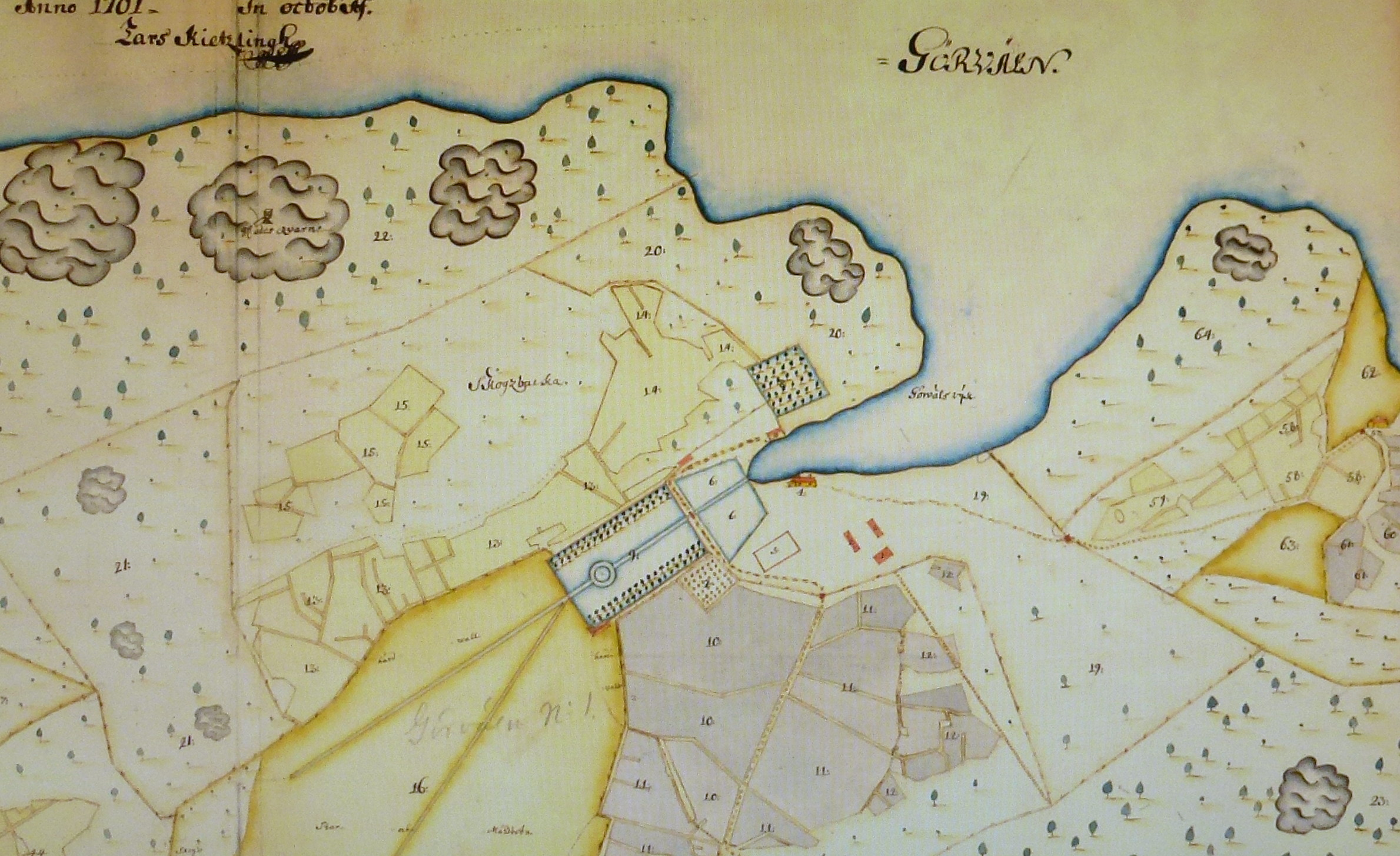 Görvälns slott på en arealavmätning 1701